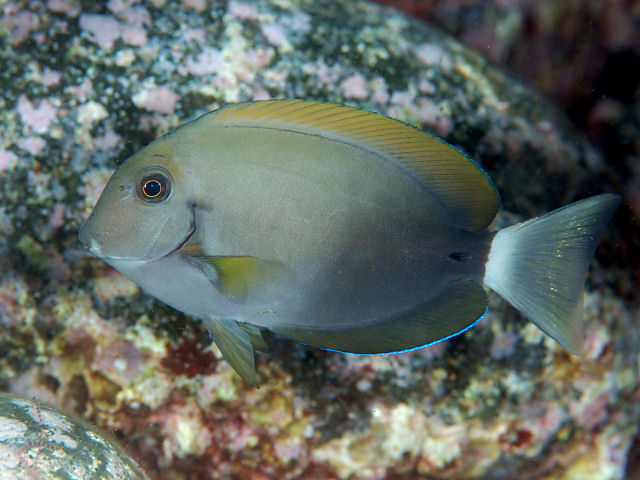 クロモンツキ Acanthurus nigricauda